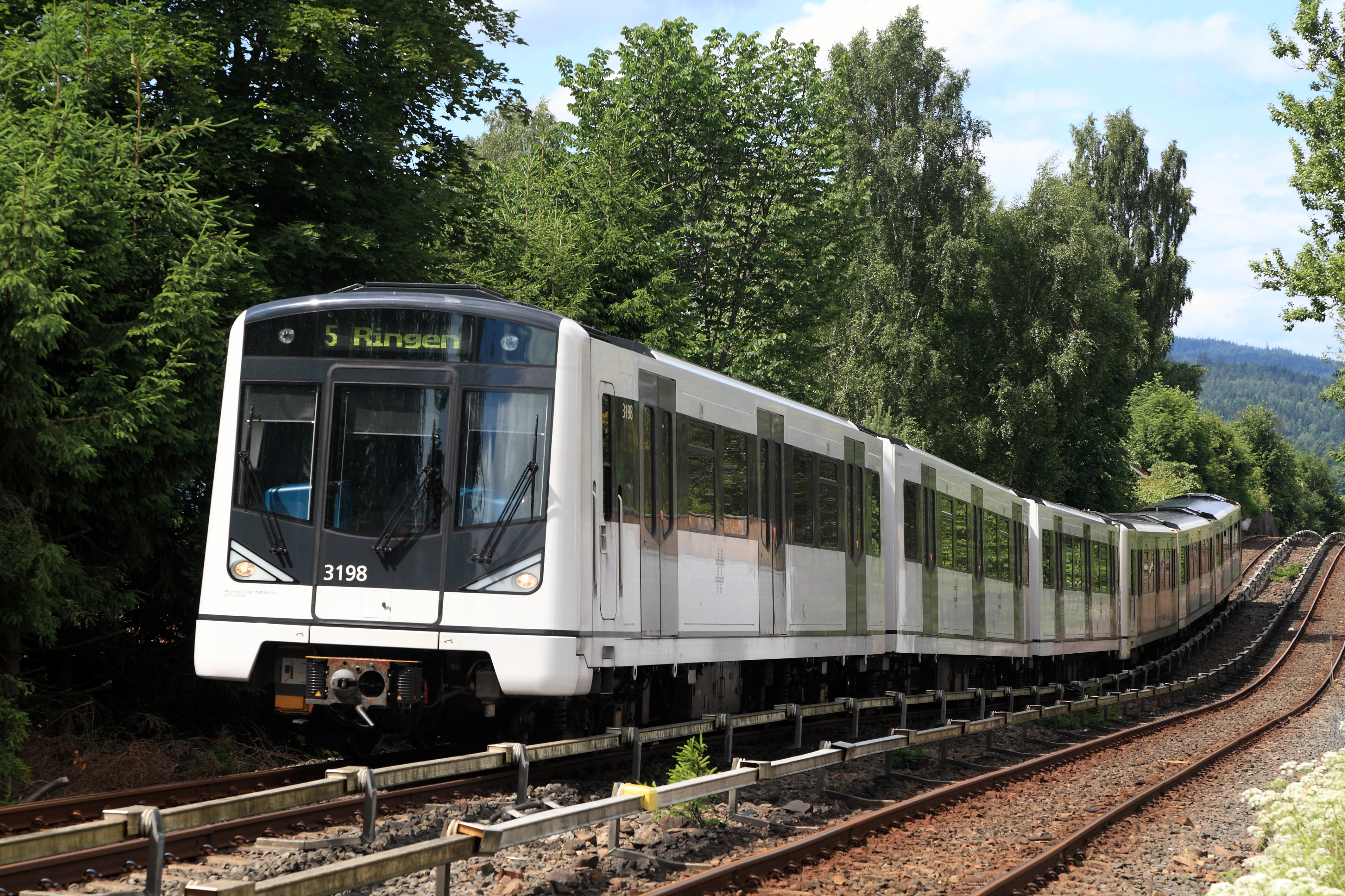 Zug auf Linie 5 zum Ring vor dem Hp Røa. Bemerkenswert die Neigungswechsel im Gleis.